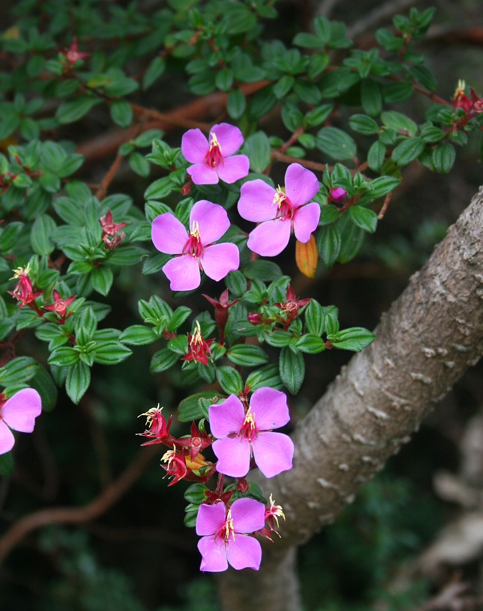 Monochaetum vulcanicum, Schwarzmundgewächse (Melastomataceae) - Costa Rica: Prov. Alajuela, Cordillera Central, Parque Nacional Volcán Poás, 2550-2600 m